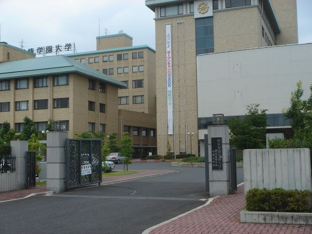 岐阜聖徳学園大学の岐阜キャンパス正門(岐阜県岐阜市) 撮影：投稿者(利用者:Monami)、撮影日：2005年7月